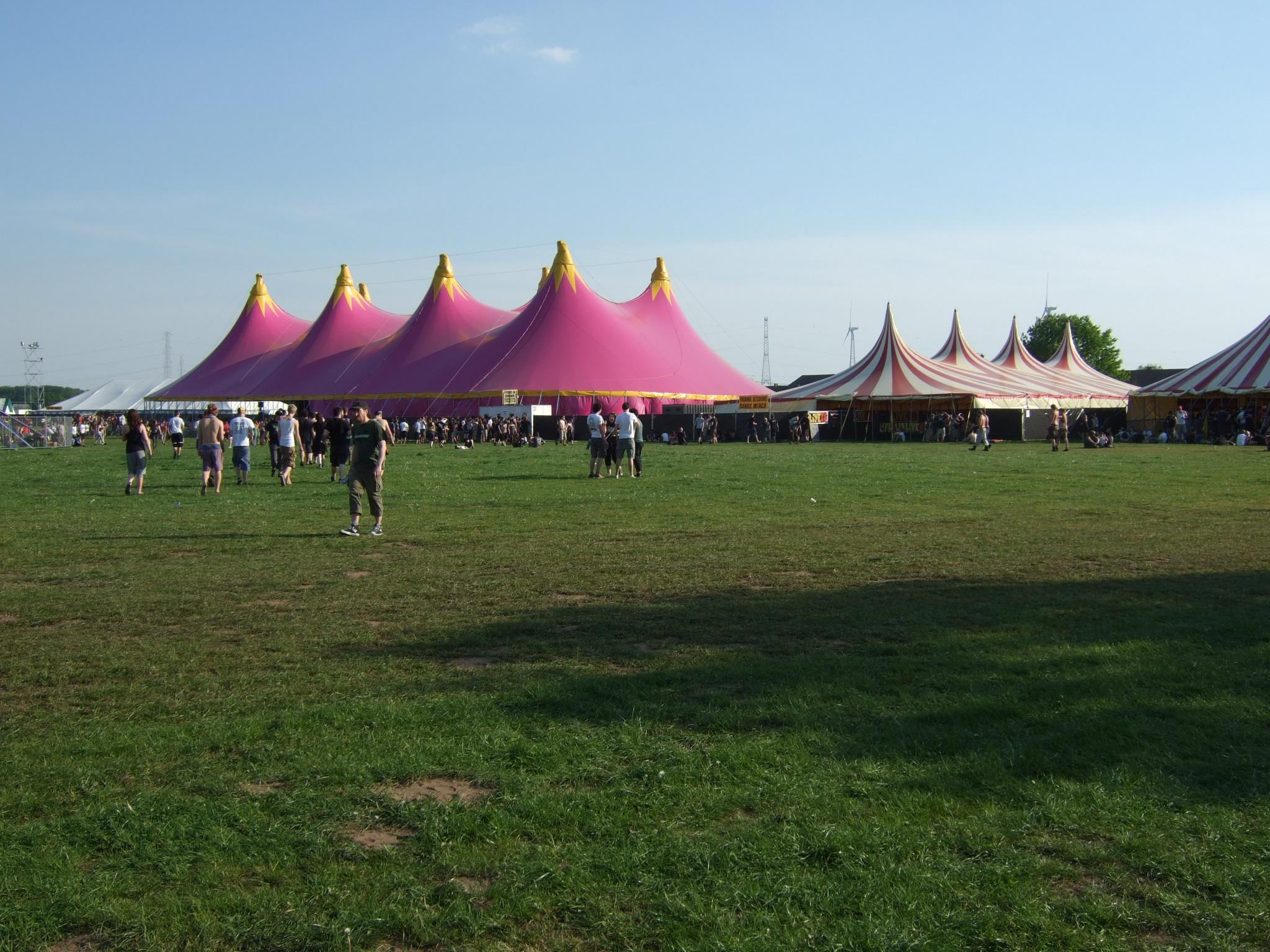 Das Gelände des GROEZOCK-Festivals